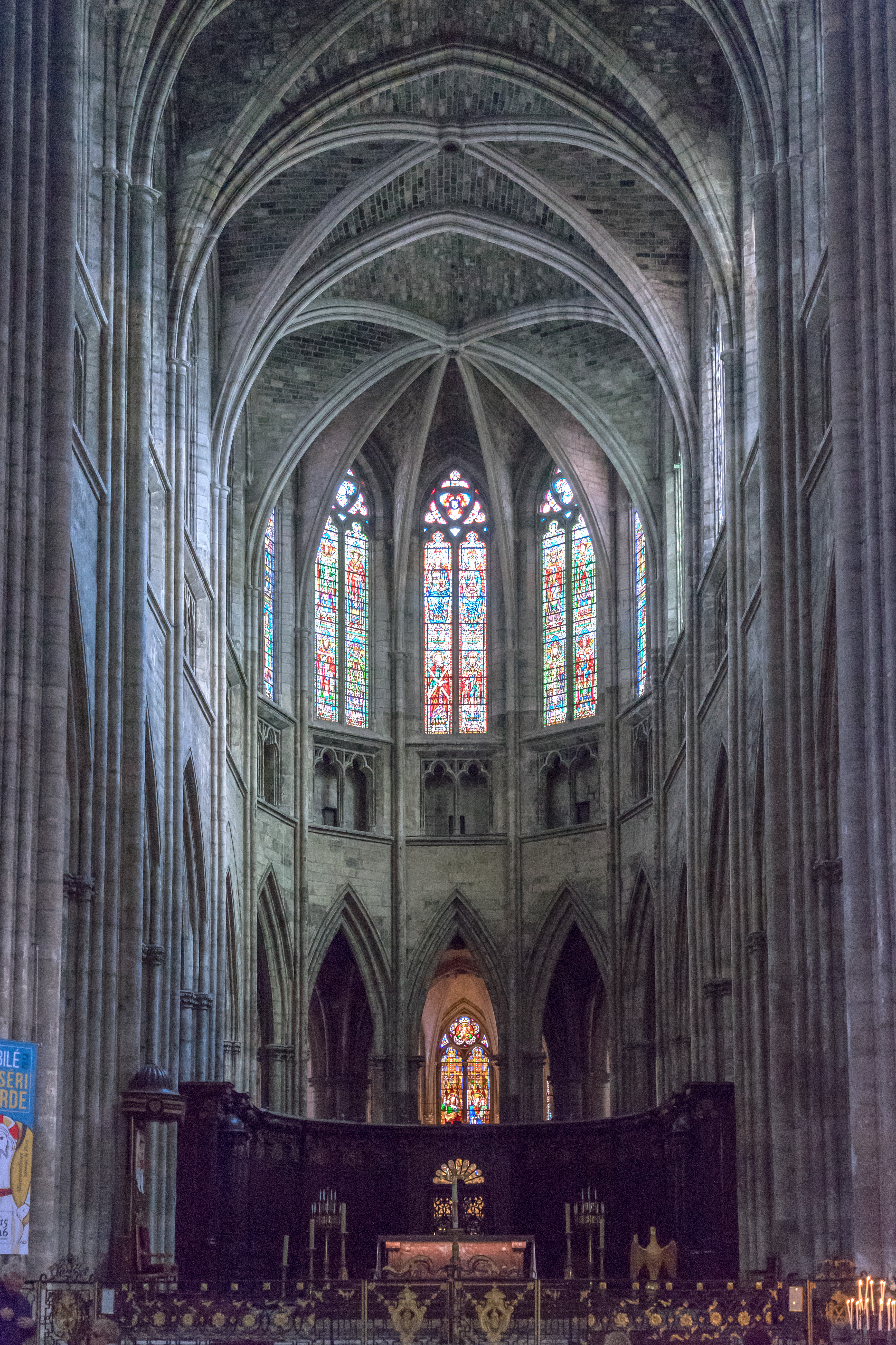 Bordeaux - Cathédrale St André - Choeur